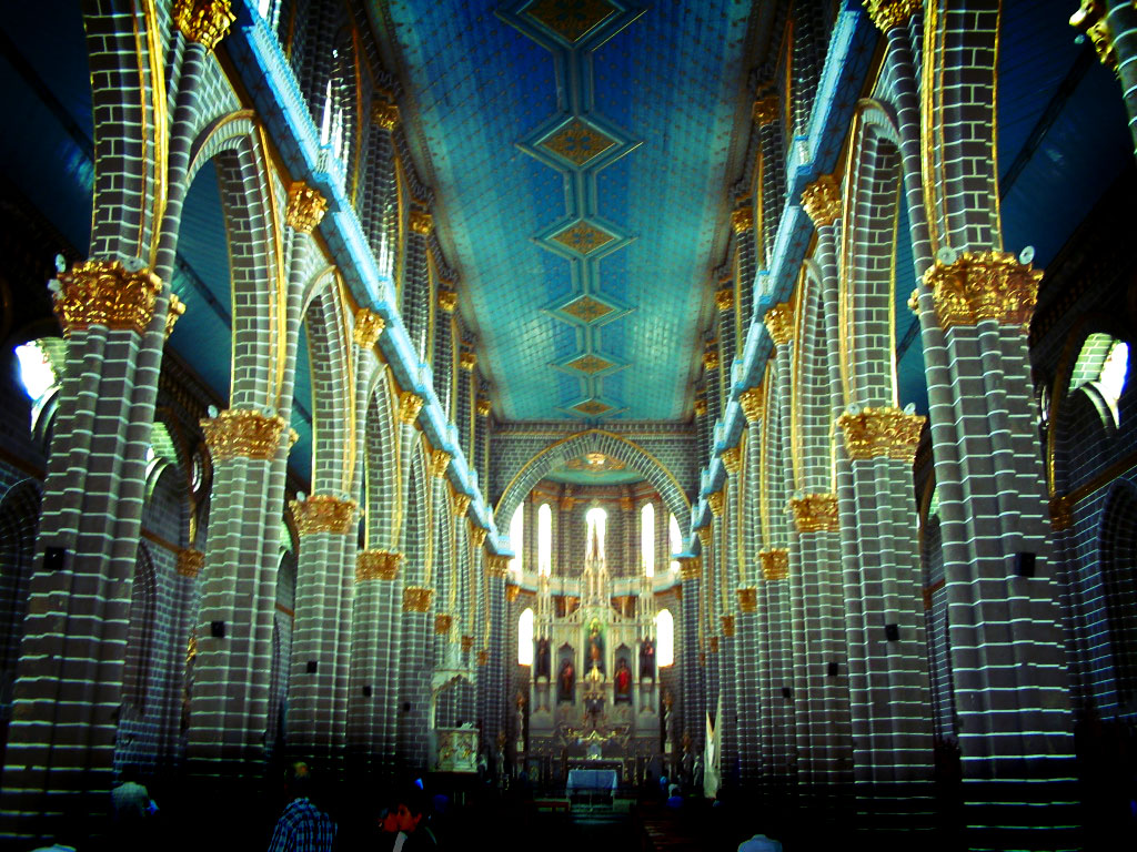 Iglesia del Municipio de Jardín, Antioquia.